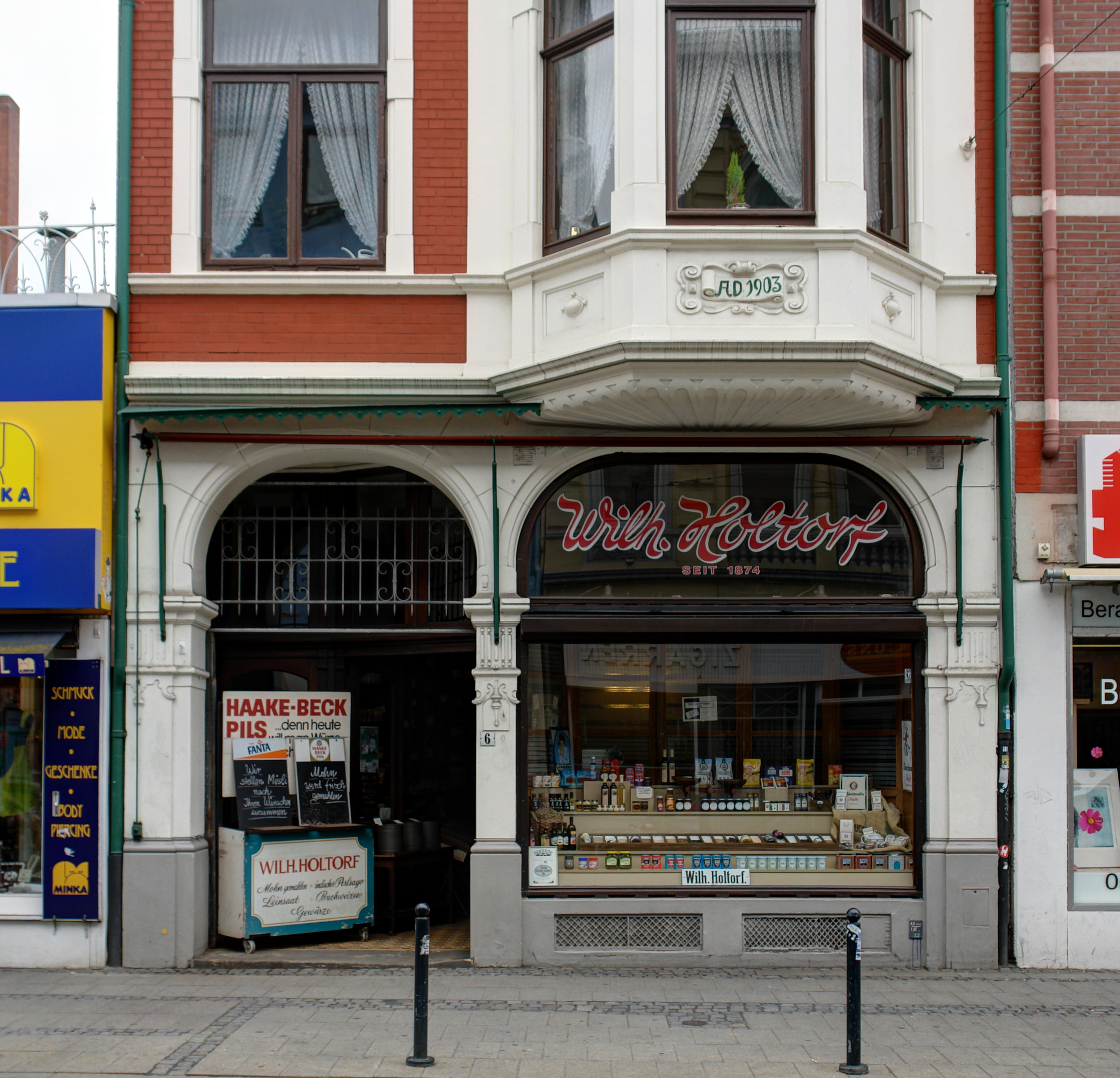 Feinkostgeschäft Wilh. Holtorf in Bremen, Ostertorsteinweg 6Das abgebildete Objekt ist ein geschütztes Kulturdenkmal in der Freien Hansestadt Bremen, mit der Nr. 0972 beim Landesamt für Denkmalpflege registriert.